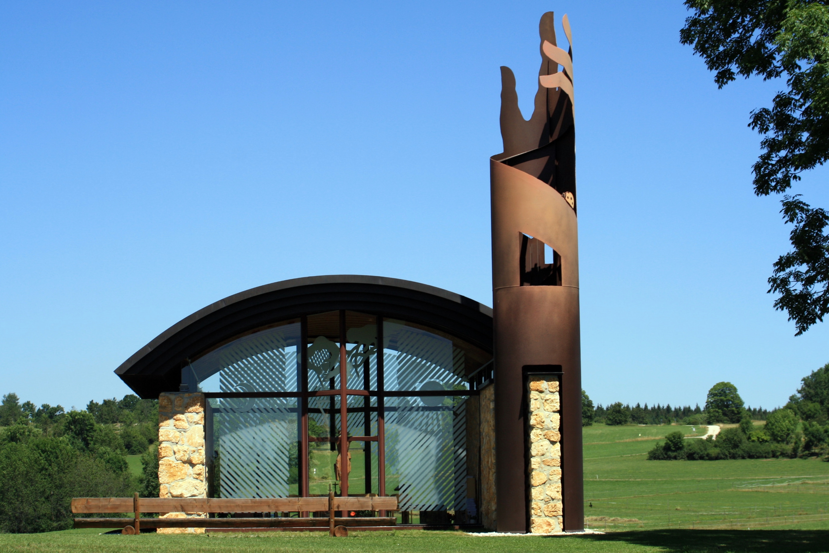 Außenansicht